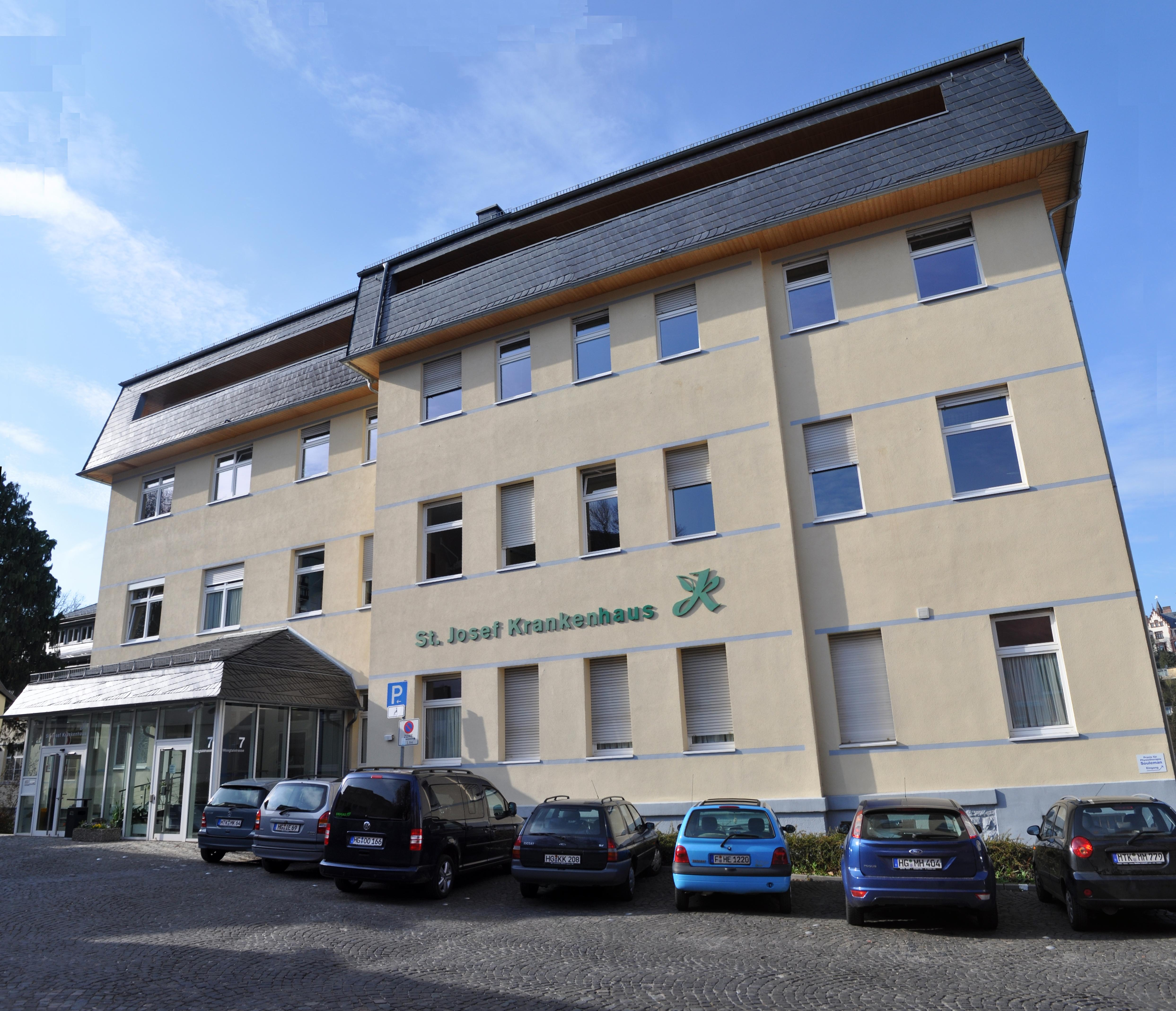 Königstein St. Josefs Krankenhaus, das Bild ist aus mehreren Bildern zusammengesetzt